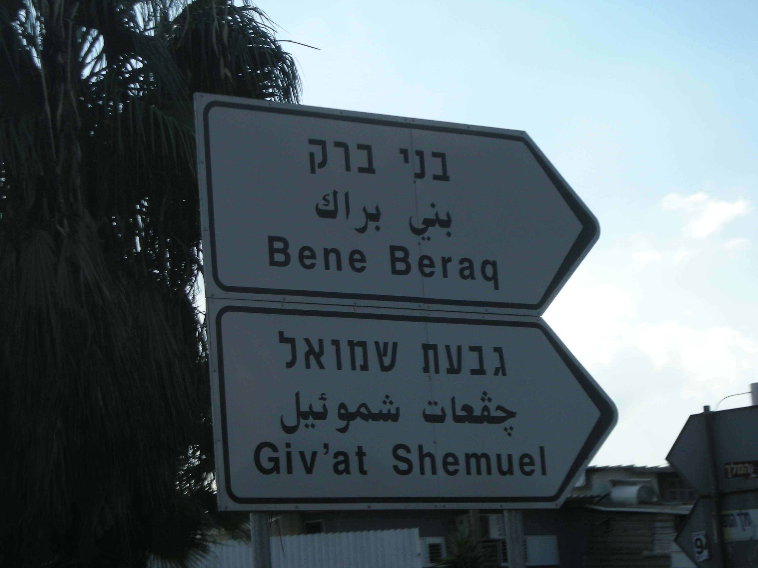 Sign in Israel